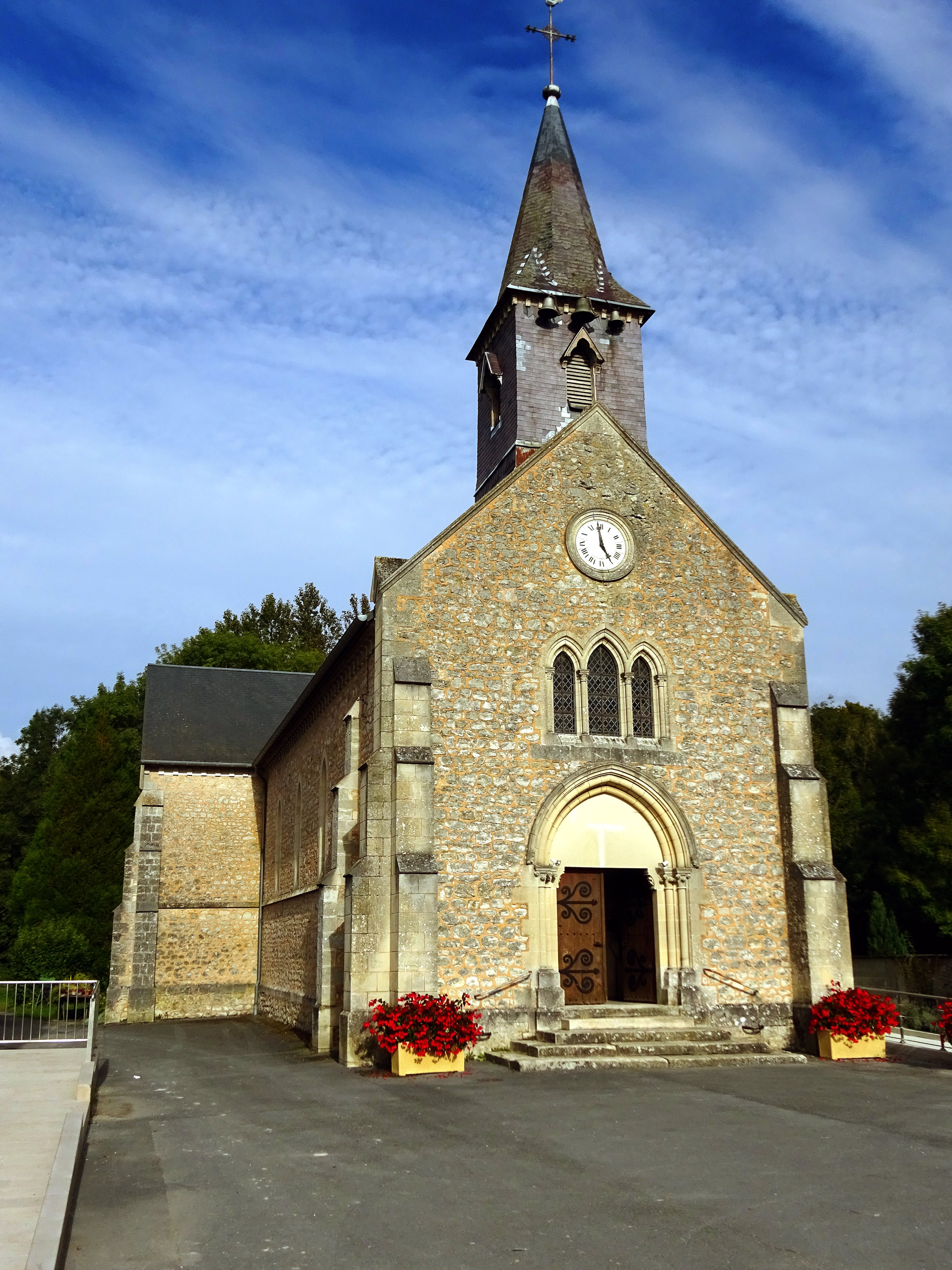 Église st-Martin de Vouzy (Marne, France)